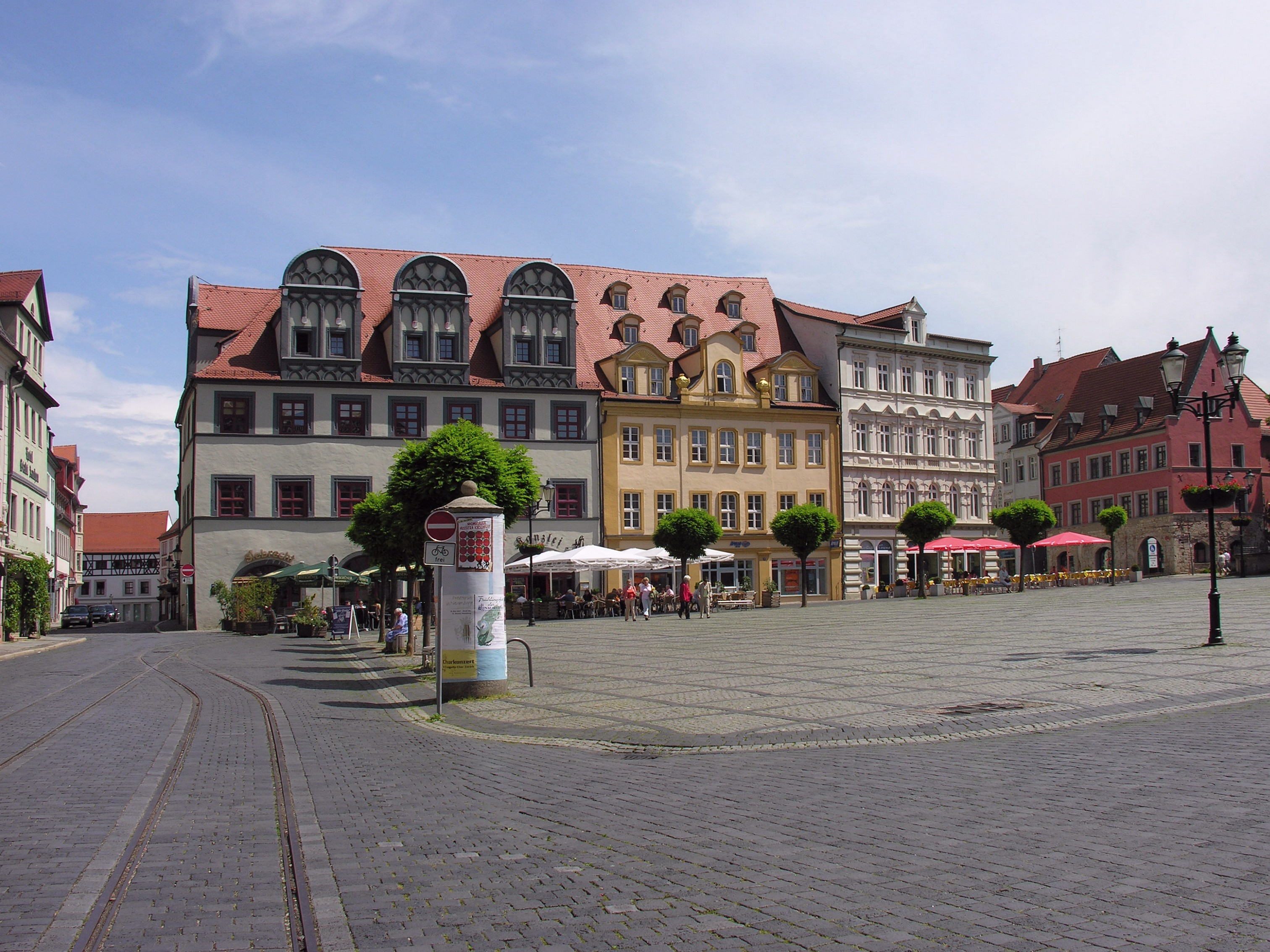 Historischer Marktplatz in Naumburg mit Bürgerhäusern und Renaissancehäusern 2007